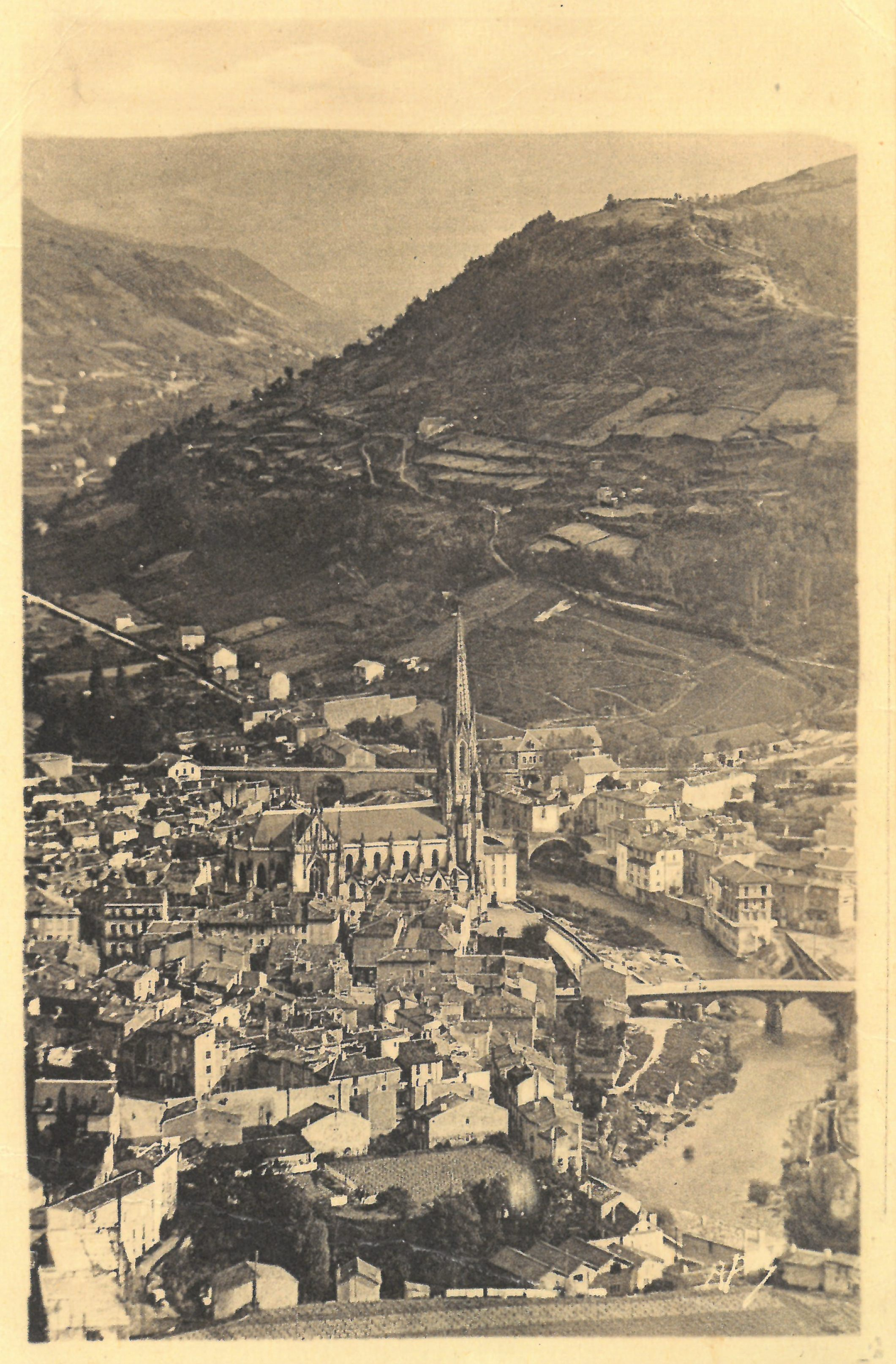 Saint-Affrique : Vue générale. Carte postale envoyée le 29 juillet 1939. Les Cartes A.P.A. Poux, Albi.